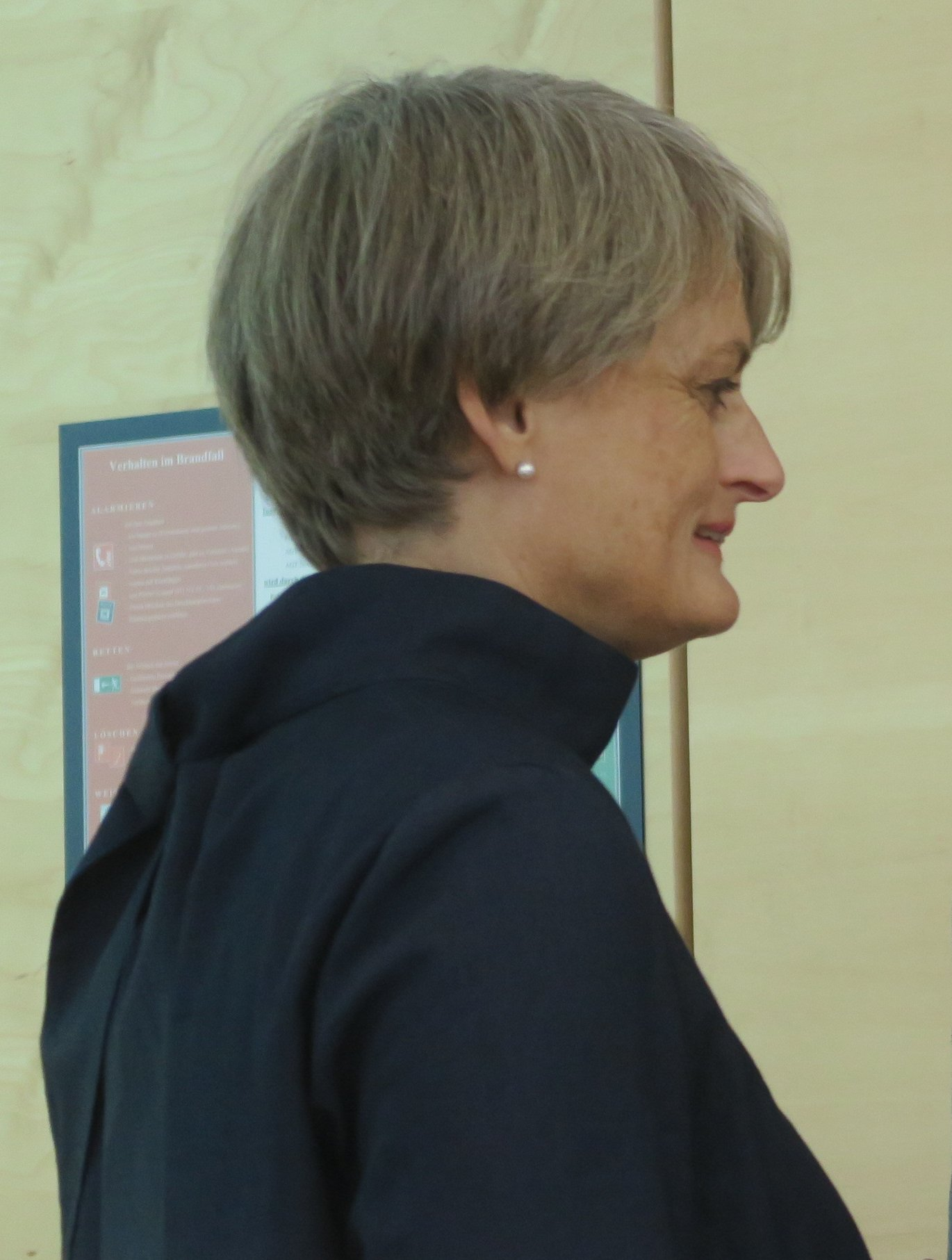 Ingrun Fußenegger, Sängerin, Dirigentin und Chorleiterin, Wien Oktober 2018